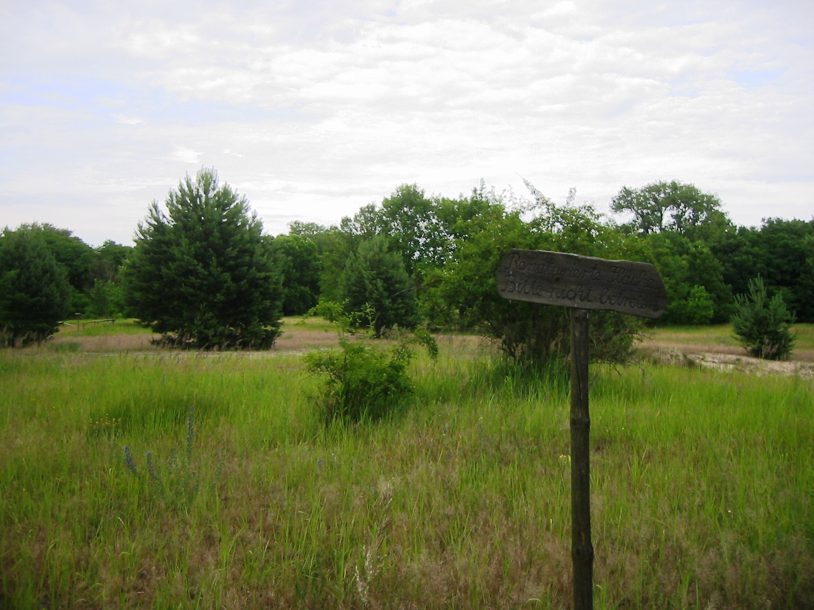 Ausblick vom Kaniswall auf die Gosener Wiesen in Berlin-Müggelheim